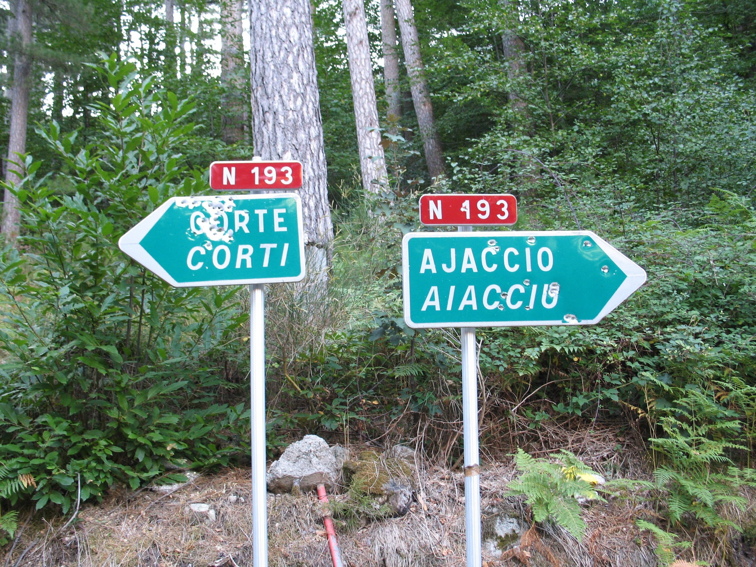 Typický korsický folklór - ukazatele u odbočky ze silnice N 193 k vizzavonskému nádraží s prostřílenými francouzskými názvy destinací